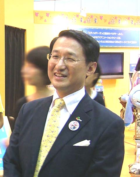 平井伸治鳥取県知事